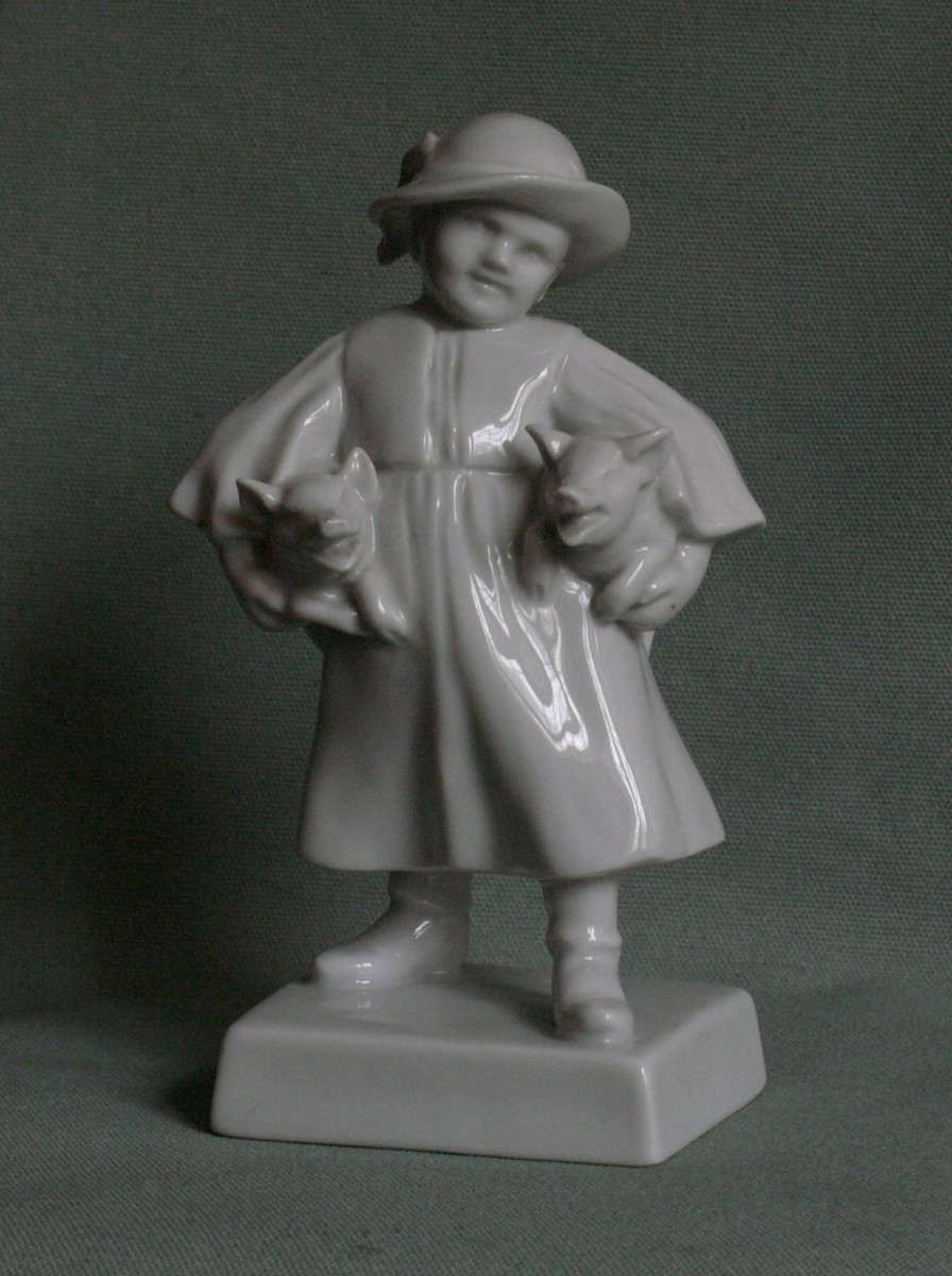 Benczúr Olga Malacos fiú c. herendi porcelán kisplasztikája